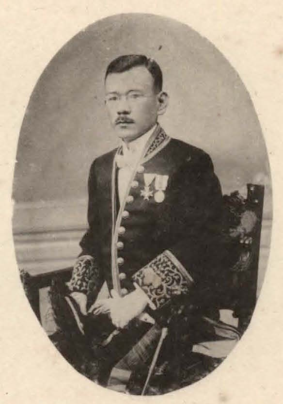 Bân-lâm-gú: 矢田部保吉 Yatabe Yasukichi